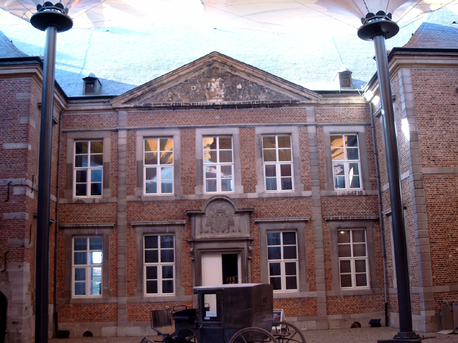 Zicht op overdekte binnehof van de waterburcht Alden Biesen te Bilzen